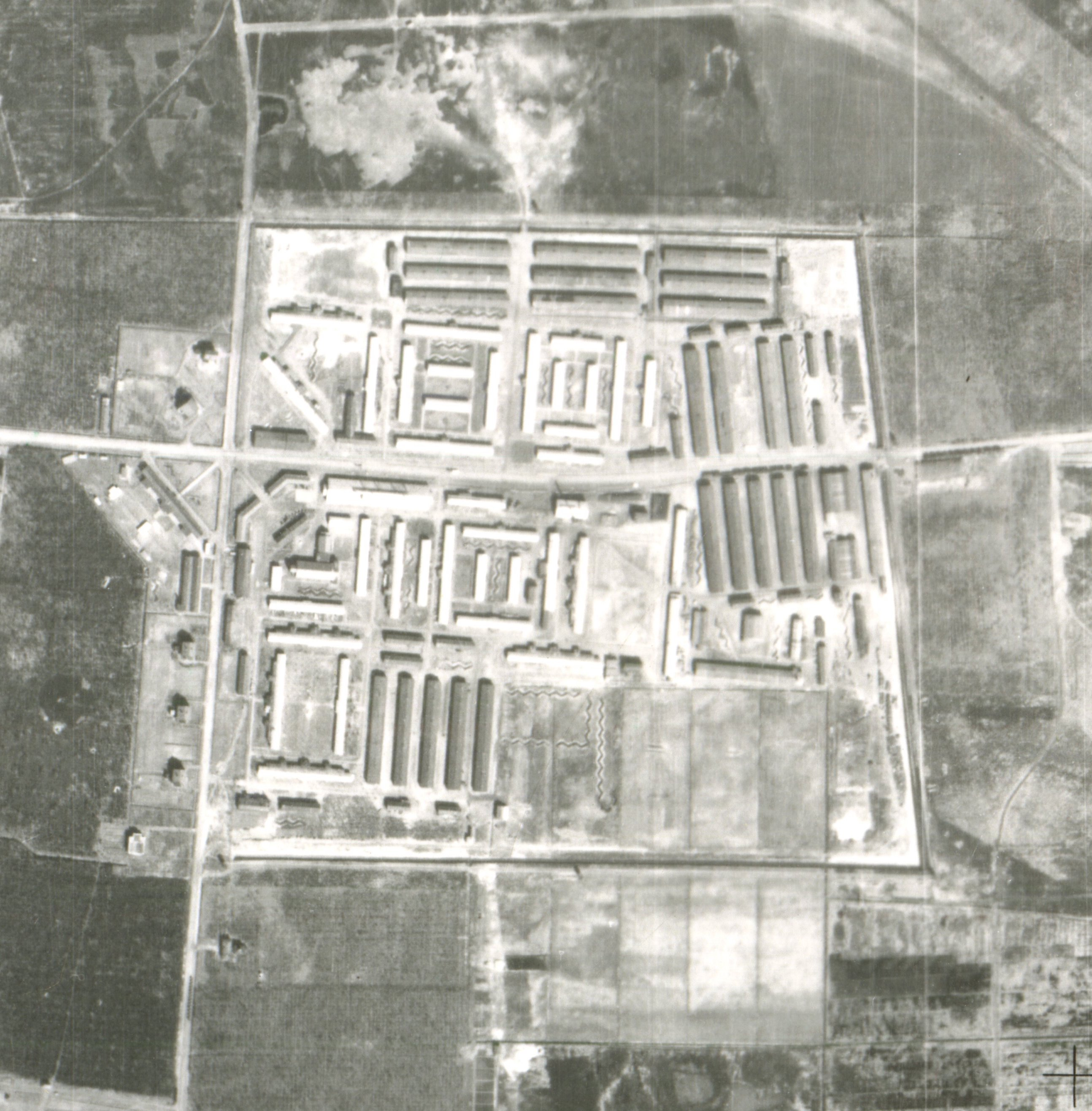 jaar 1945 datum 22-03-1945 bestand 16-1912_3176 bron Kadaster WOII Luchtfoto's sortienummer 16-1912 Doos Nr 500 run 3174-3198 fotonummer 3176